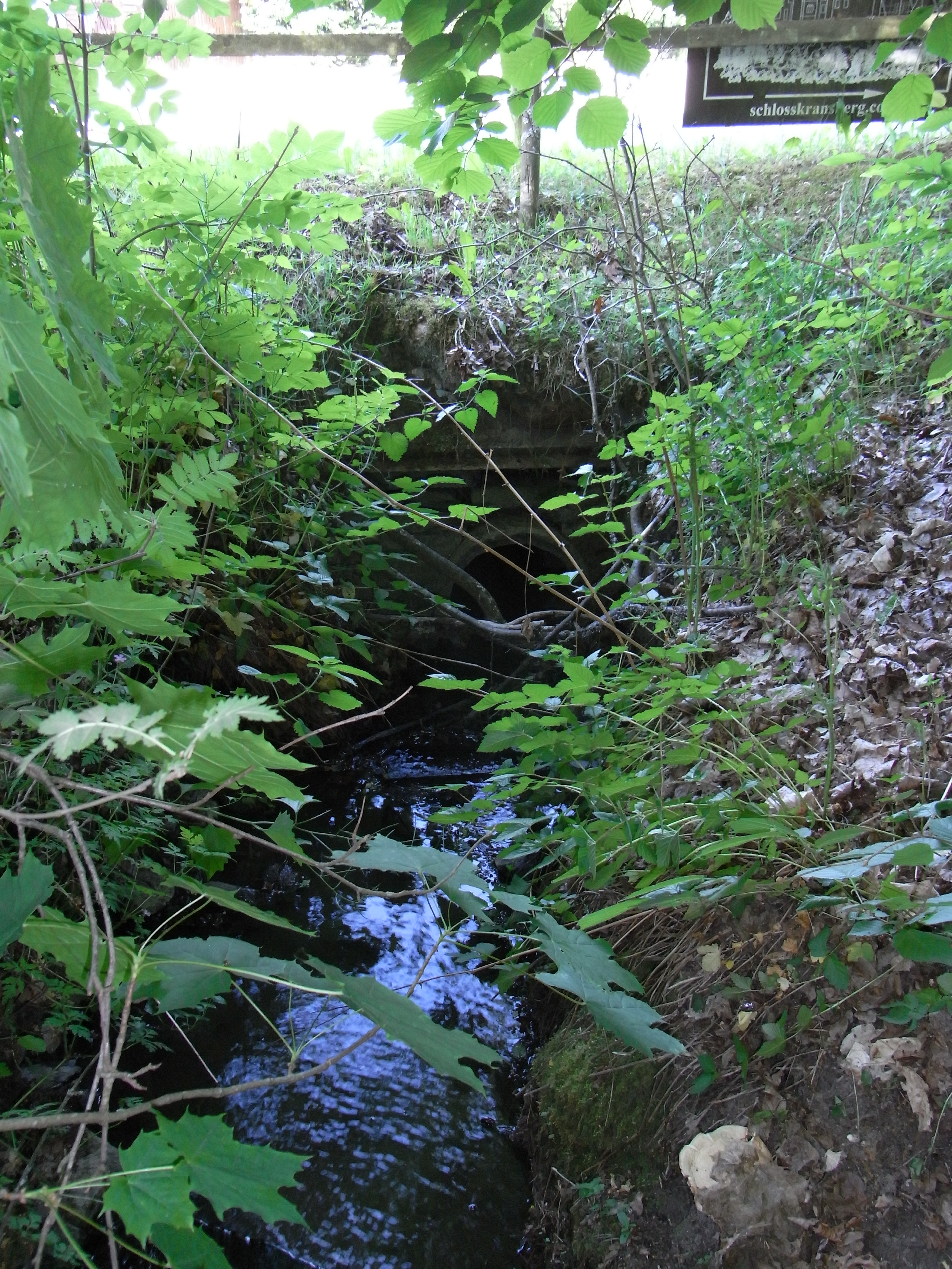 Bach verschwindet im Durchlass unter der Hauptstraße/Kreisstraße 728 in Kransberg